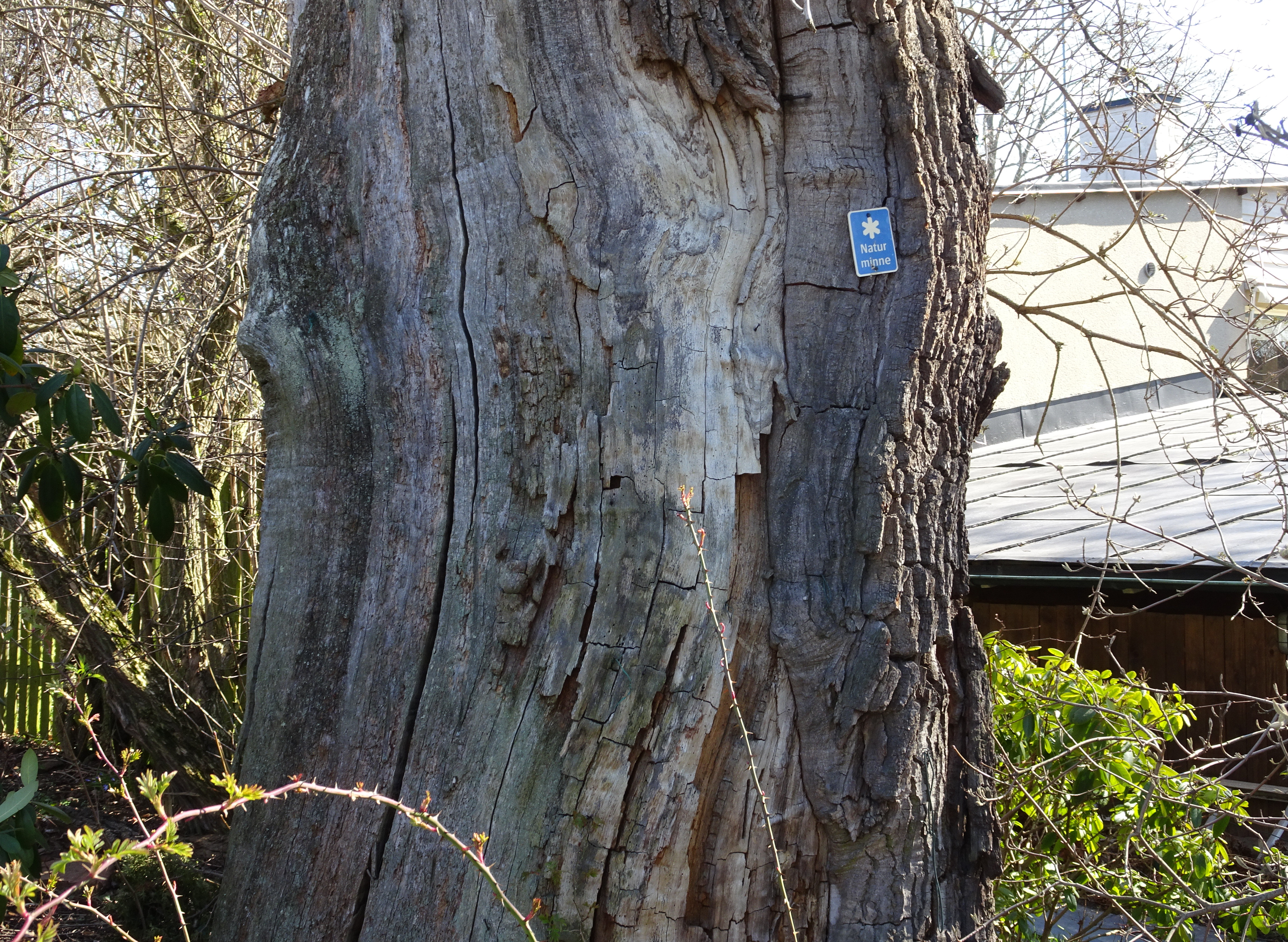 Naturminne "Berzelii ek" i Kevinge, Danderyds kommun